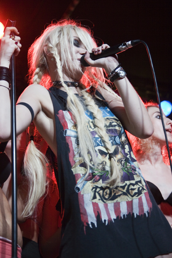 Taylor Momsen, vocalista de The Pretty Reckless, actuando en la sala Razzmatazz de Barcelona.